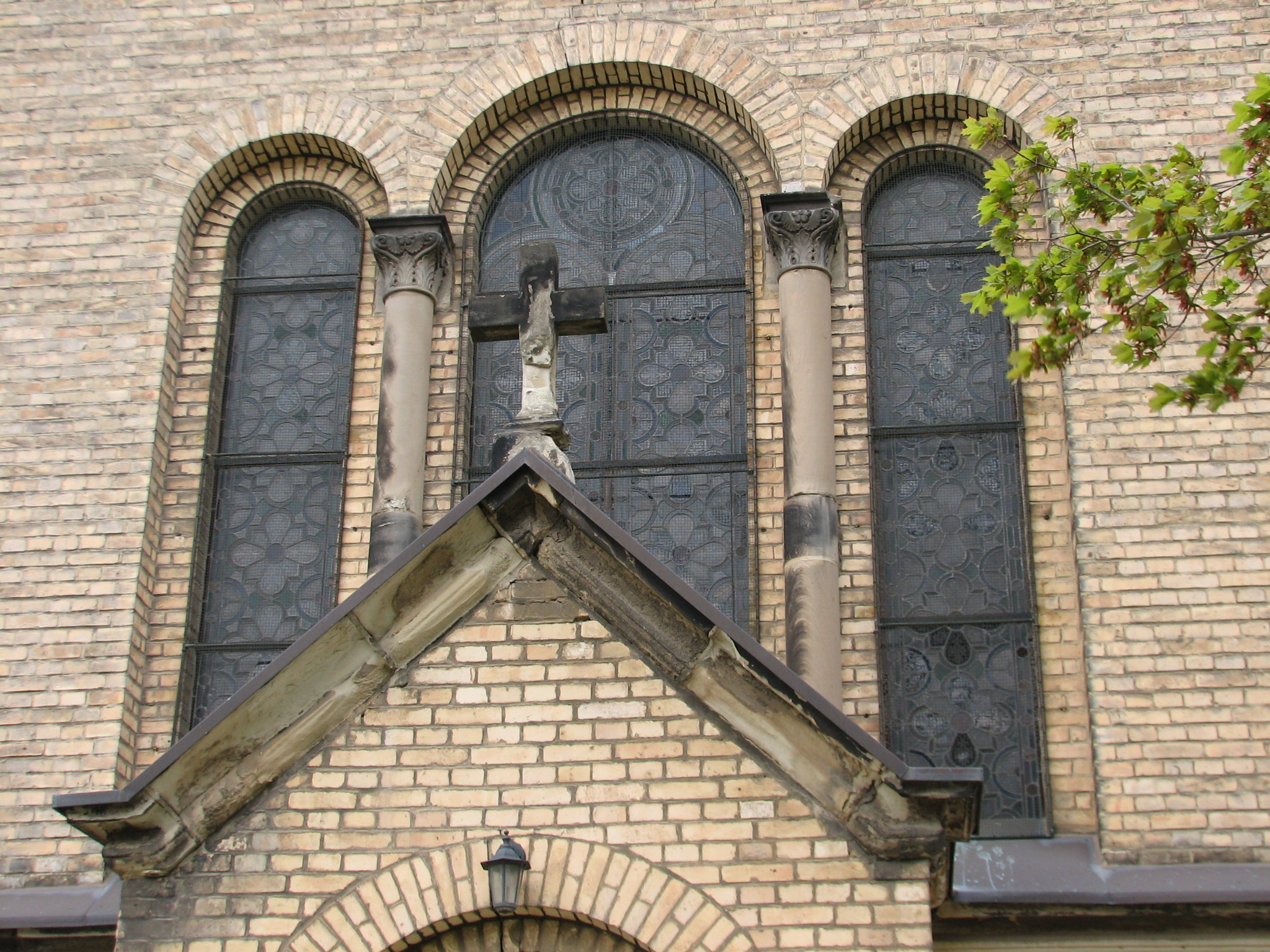 Kirche zu Leopoldshall, Foto vom April 2019